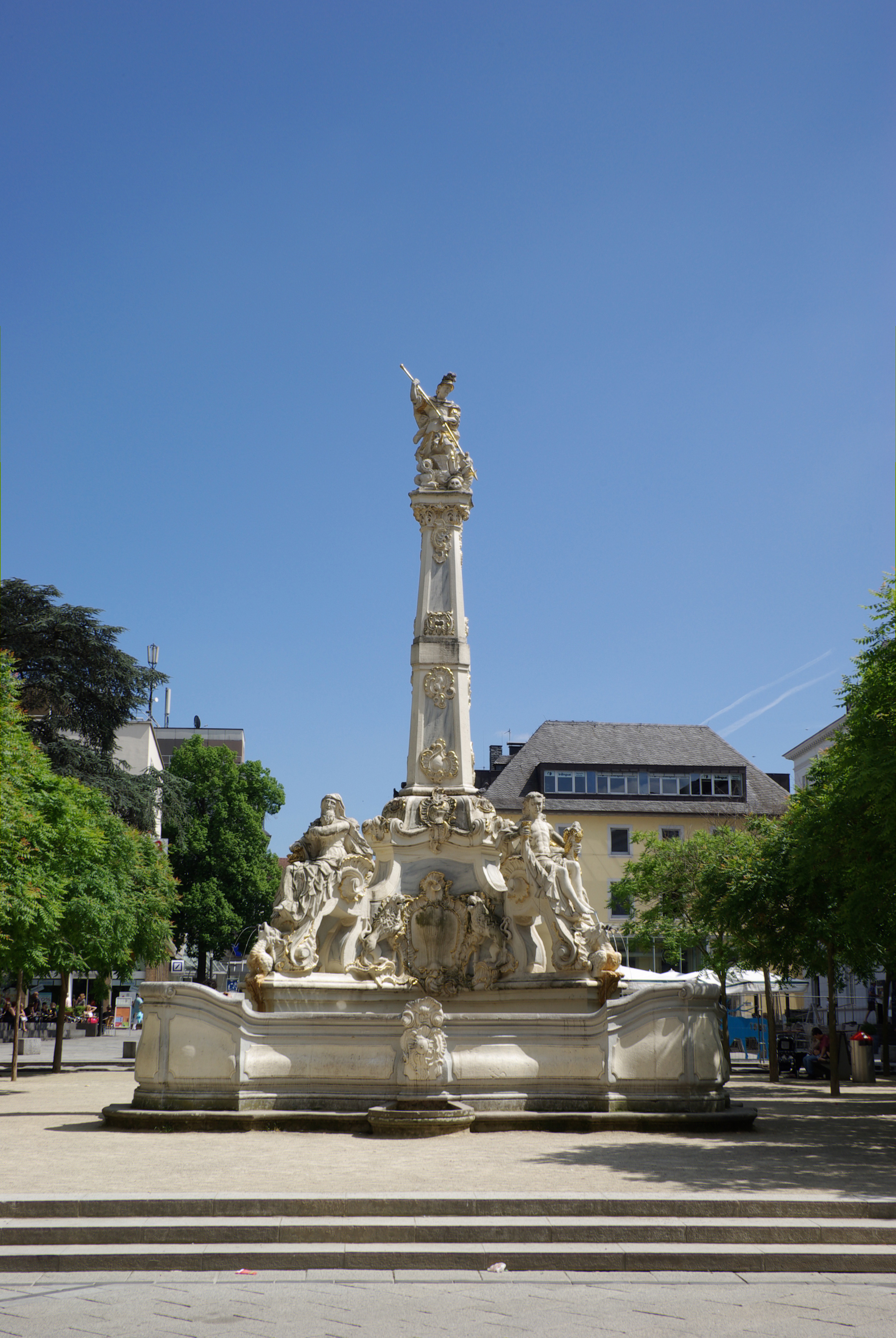 Trier, Kornmarkt ohne Nummer: Sankt Georgsbrunnen; Rokokobrunnen mit Darstellungen der vier Jahreszeiten und des heiligen Georg als Drachentöter auf Obelisk, 1749, Architekt Johannes Seiz, Bildhauer Joseph Amlinger, Steinhauer Micheln Schmitt und Johannes Steinem